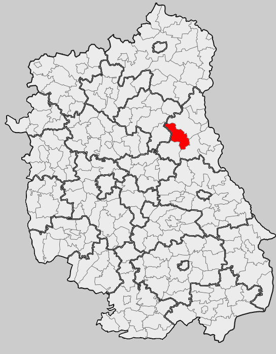 Map of gmina Stary Brus, Włodawa county, Lublin voivodship Mapa gminy Stary Brus, powiat włodawski, województwo lubelskie